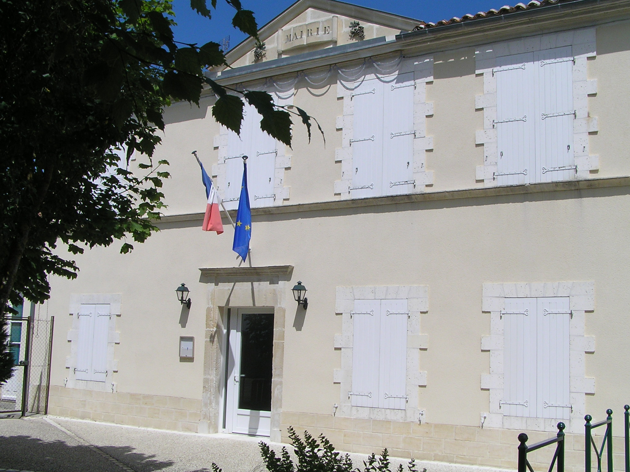 mairie d'Échallat